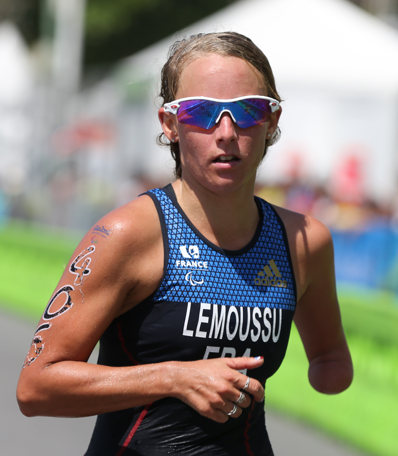 Rio de Janeiro - Provas de triatlo feminino PT4, PT2 e PT5, em Copacabana. Competição da categoria PT5. (Tânia Rêgo/Agência Brasil)